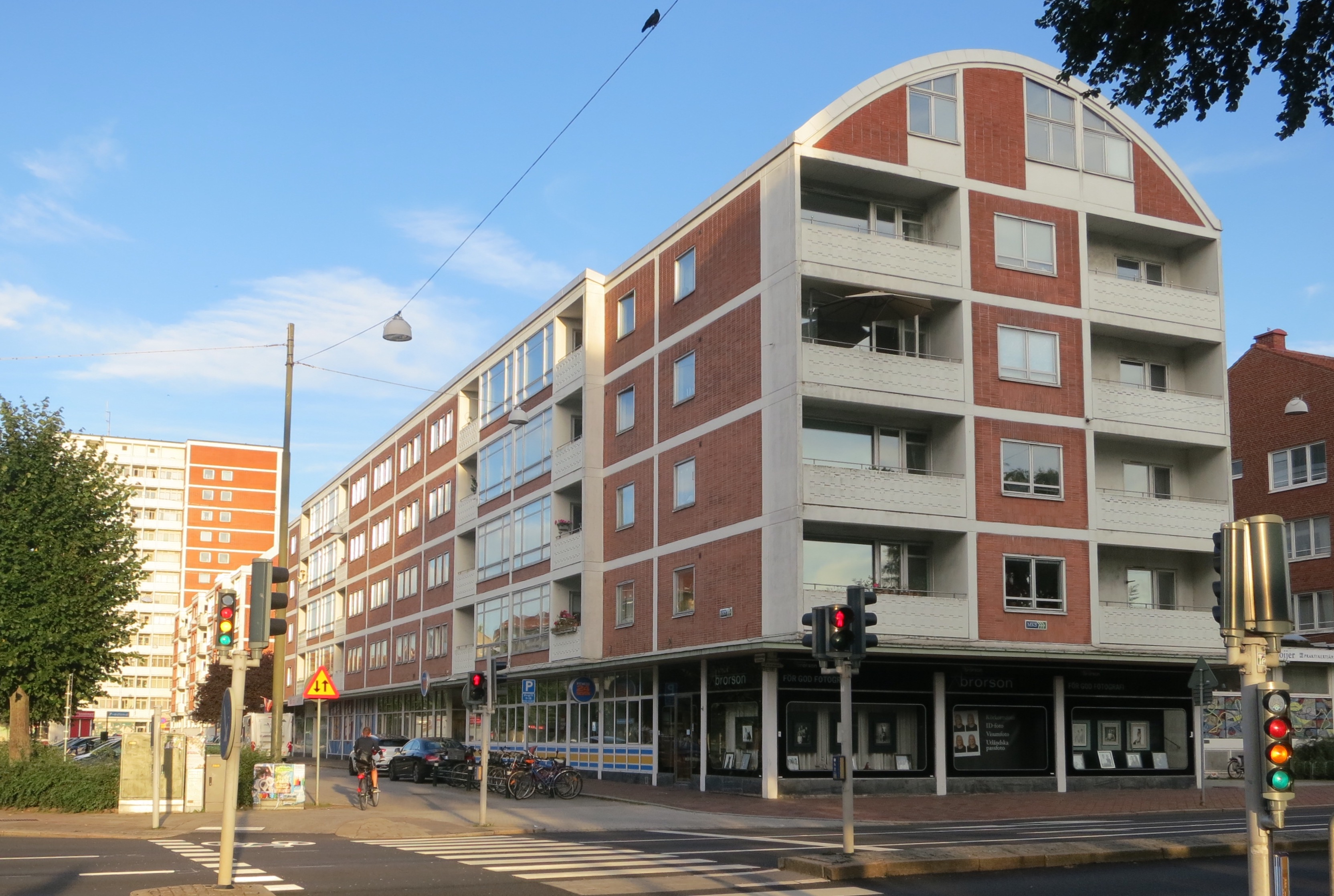 Boggivagnen, Köpenhamnsvägen, Malmö